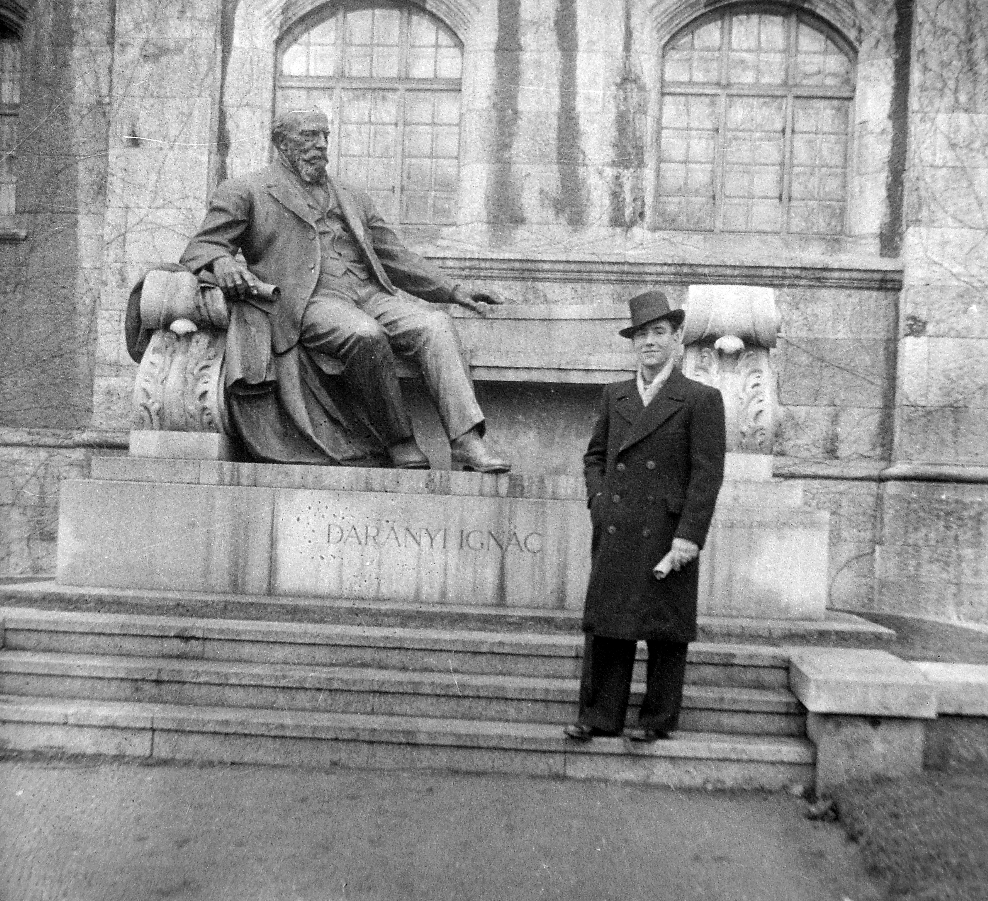 Darányi Ignác szobra (1931, Kisfaludi Strobl Zsigmond) a Mezőgazdasági Múzeum tó felőli oldalán (a II. világháború alatt megsérült, később megsemmisült). 2017-ben újraállították. Location: Hungary, Budapest XIV. Tags: portrait, man, sculpture, hat, Budapest Title: Darányi Ignác szobra a Mezőgazdasági Múzeum tó felőli oldalán (a II. világháború alatt megsérült, később megsemmisült).